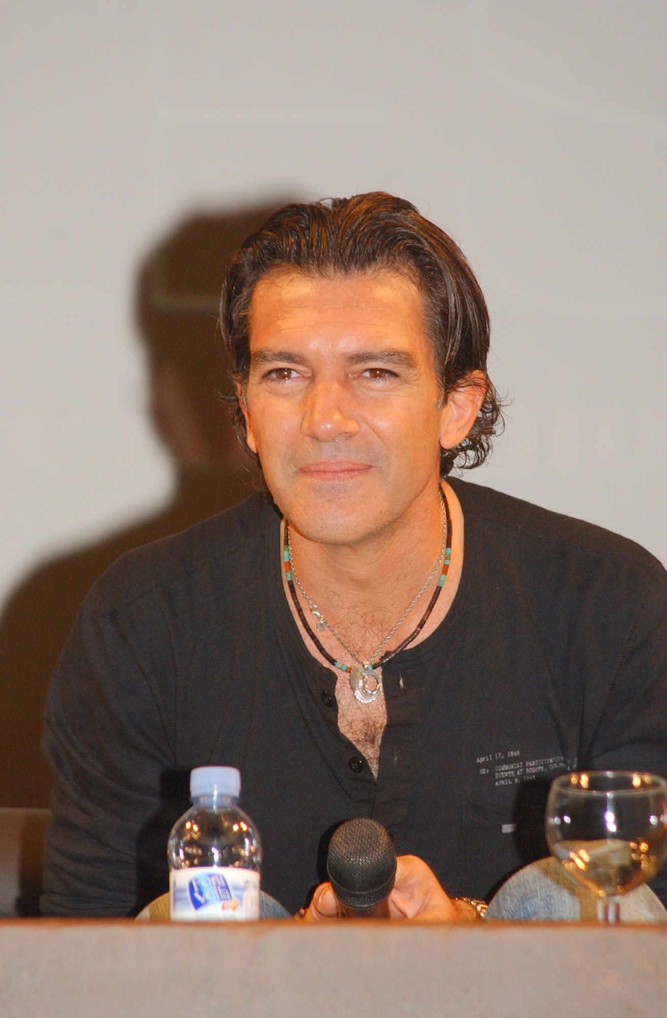 Rueda de prensa de la presentación de la película dirigida por Banderas "El camino de los ingleses" en el marco del Festival de cine de Málaga.